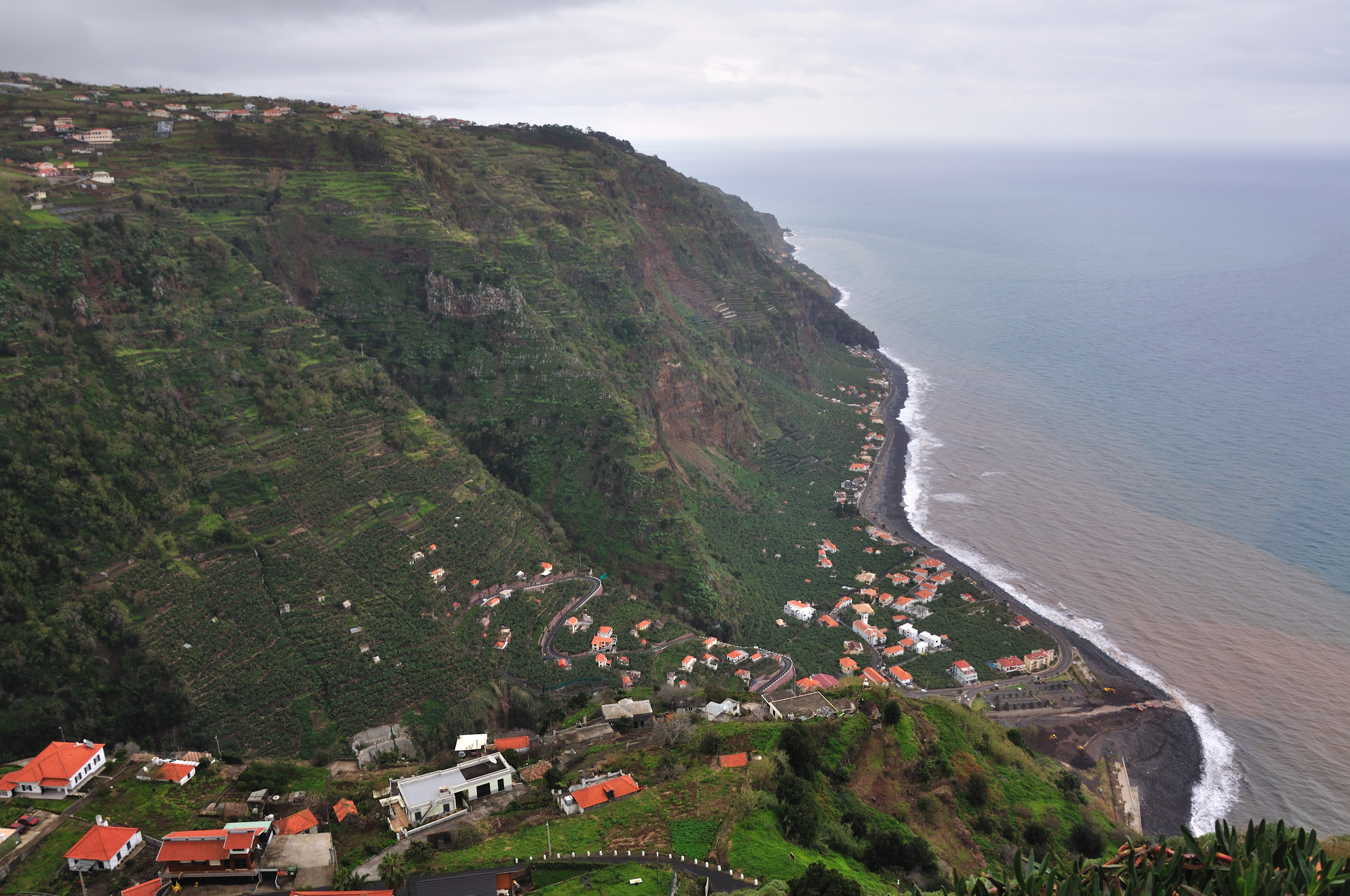 Portugal, Madeira, views in Arco da Calheta